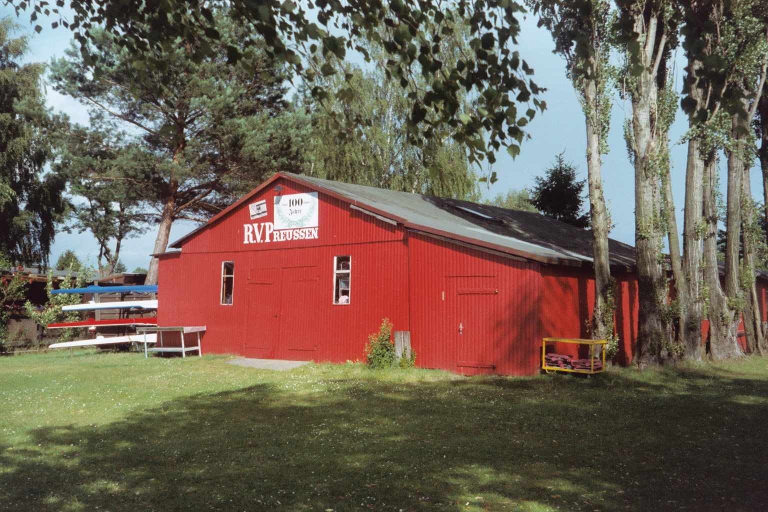 die sog. "Hiller"-Bootshalle des Ruder-Verein "Preußen" e.V. Berlin